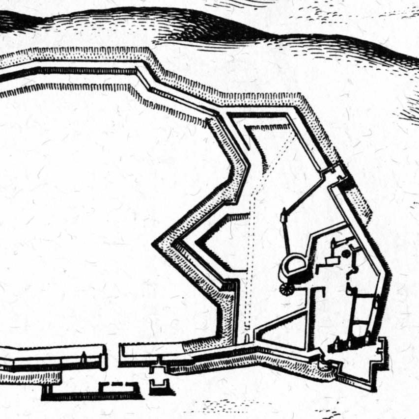 Fortifications du château des comtes d’Armagnac à Lectoure, Gers, France. Détail du plan de Mérian (XVIIe s.), domaine public